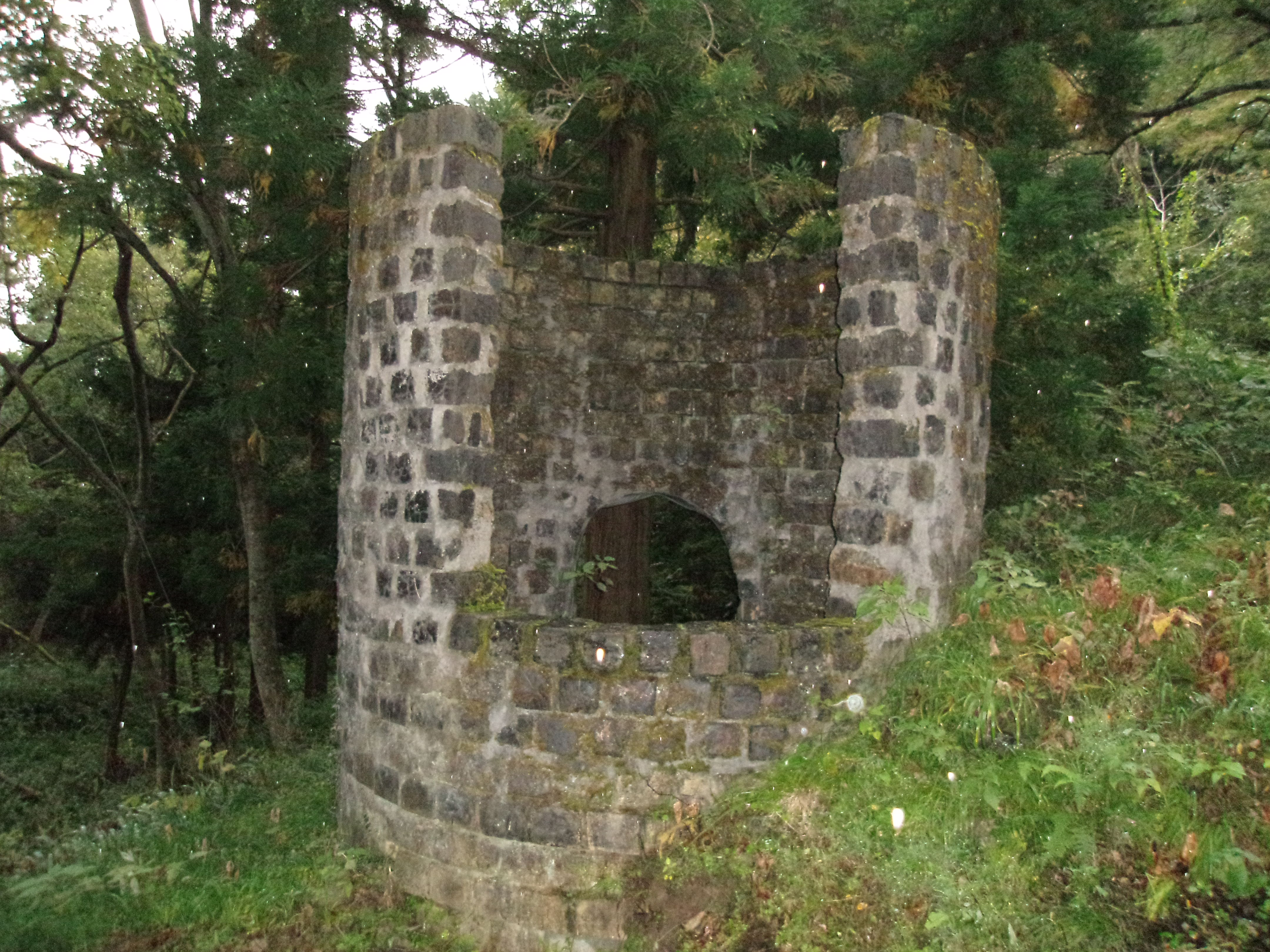 世界遺産「石見銀山」の構成資産である銀山街道鞆ヶ浦道 藤田組永久鉱山のレンガ積み煙道